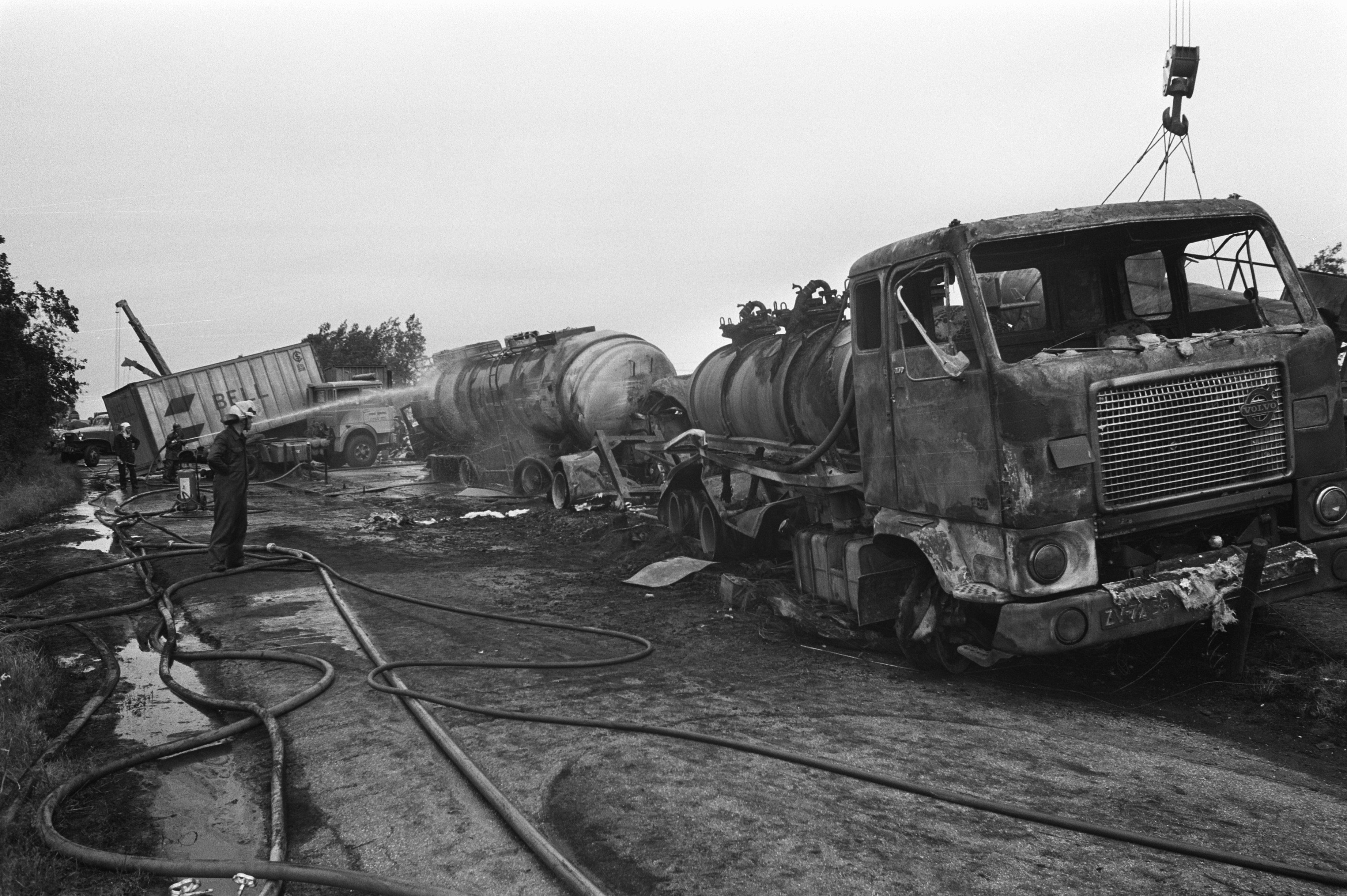 Collectie / Archief : Fotocollectie Anefo Reportage / Serie : [ onbekend ] Beschrijving : Verkeersramp (13 doden) op weg Rotterdam naar Breda bij Prinsenbeek, overzicht van de ravage Datum : 25 augustus 1972 Locatie : Prinsenbeek Trefwoorden : Verkeersrampen Fotograaf : Mieremet, Rob / Anefo Auteursrechthebbende : Nationaal Archief Materiaalsoort : Negatief (zwart/wit) Nummer archiefinventaris : bekijk toegang 2.24.01.05 Bestanddeelnummer : 925-8345